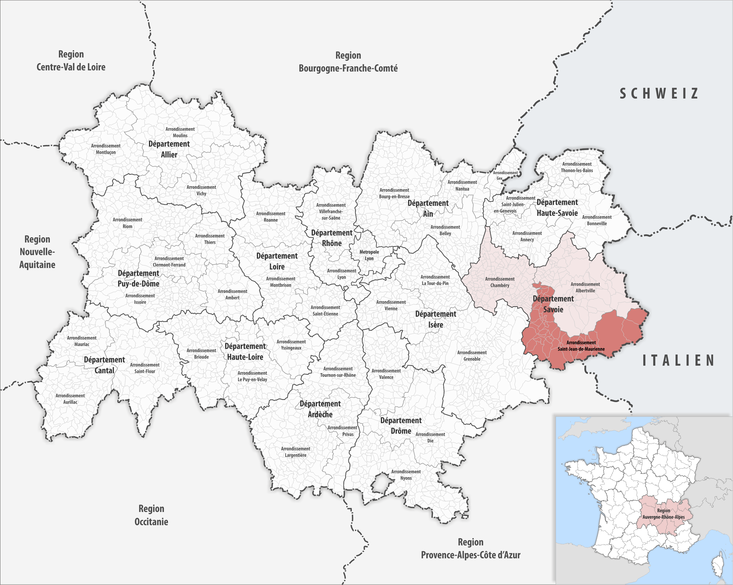 Lage des Arrondissements Saint-Jean-de-Maurienne